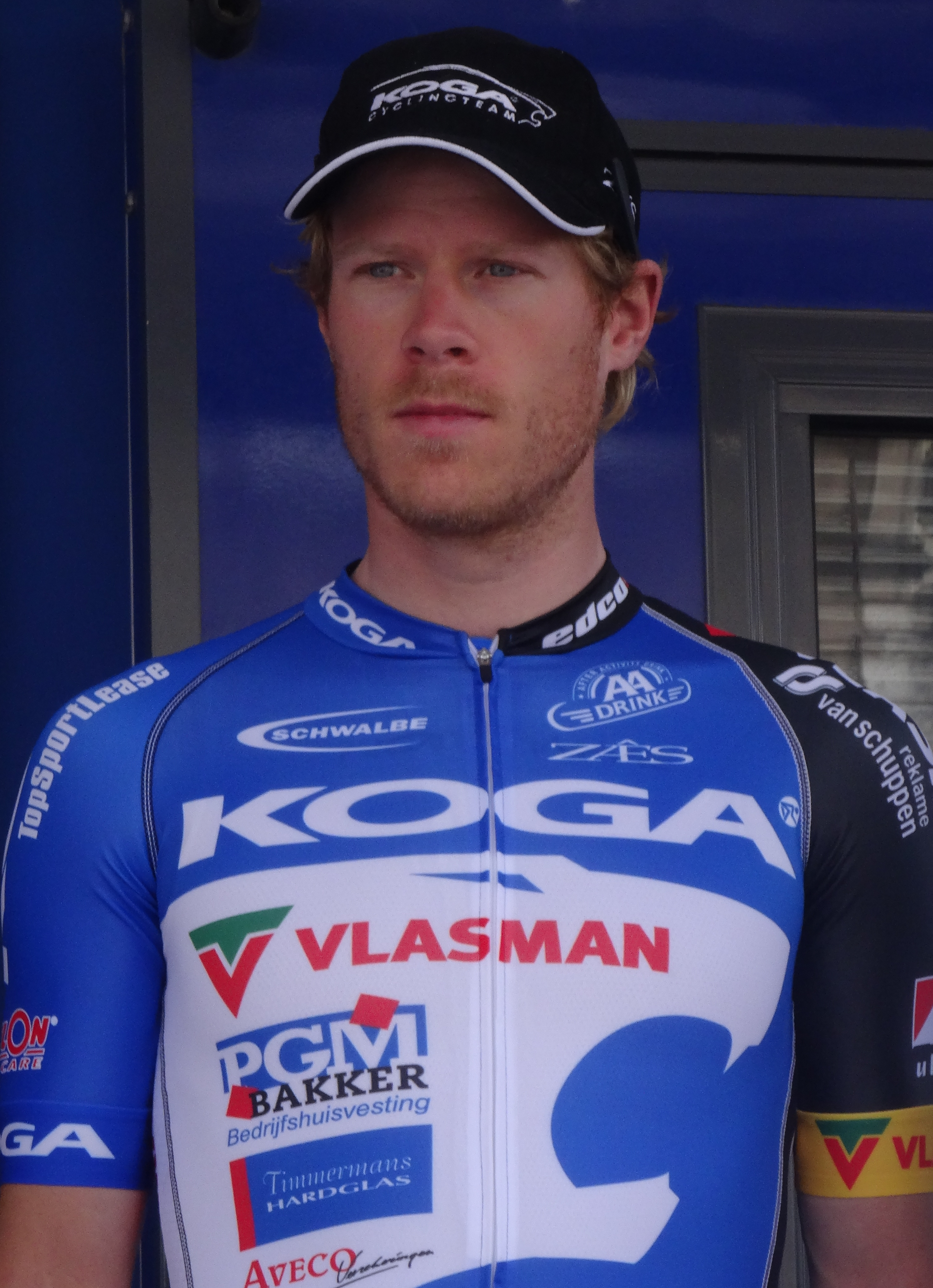 Reportage photographique réalisé le dimanche 25 mai 2014 à l'occasion du départ et de l'arrivée de la troisième étape du Paris-Arras Tour 2014 à Arras, Pas-de-Calais, Nord-Pas-de-Calais, France. Depicted person: René Hooghiemster Depicted team: Koga